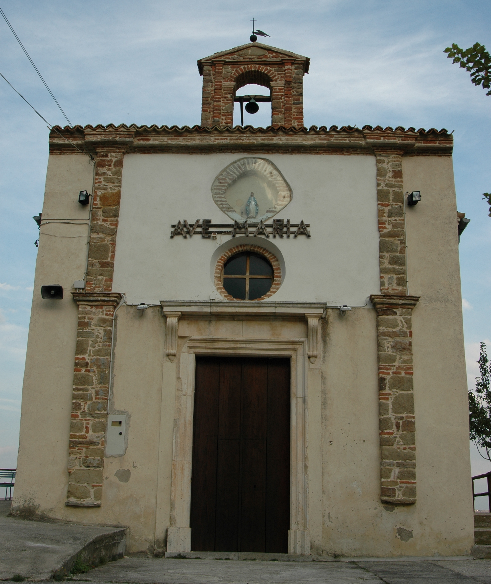 Facciata della Chiesa di San Rocco (Trivigno, PZ)